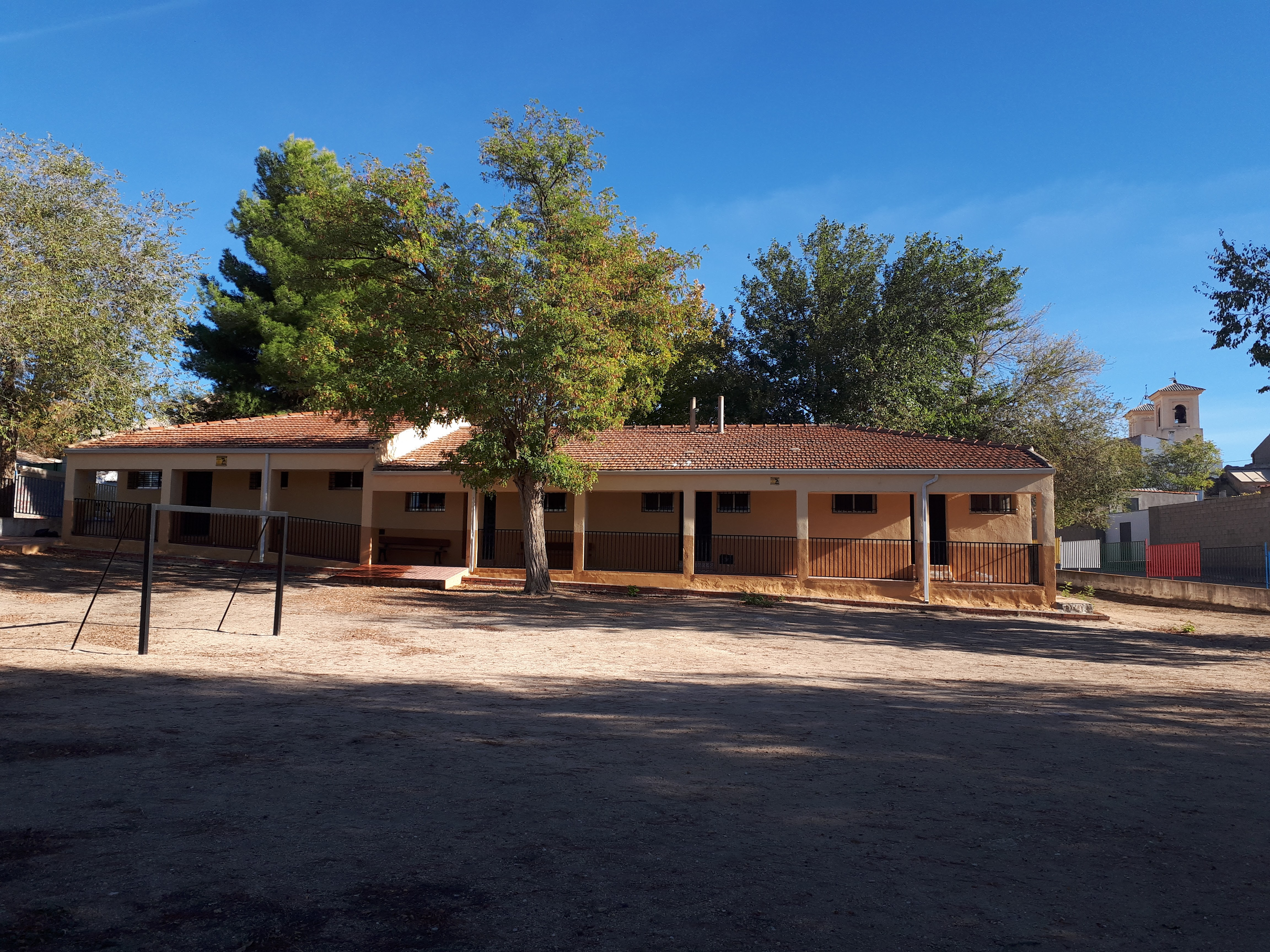 colegio de zarza de tajo